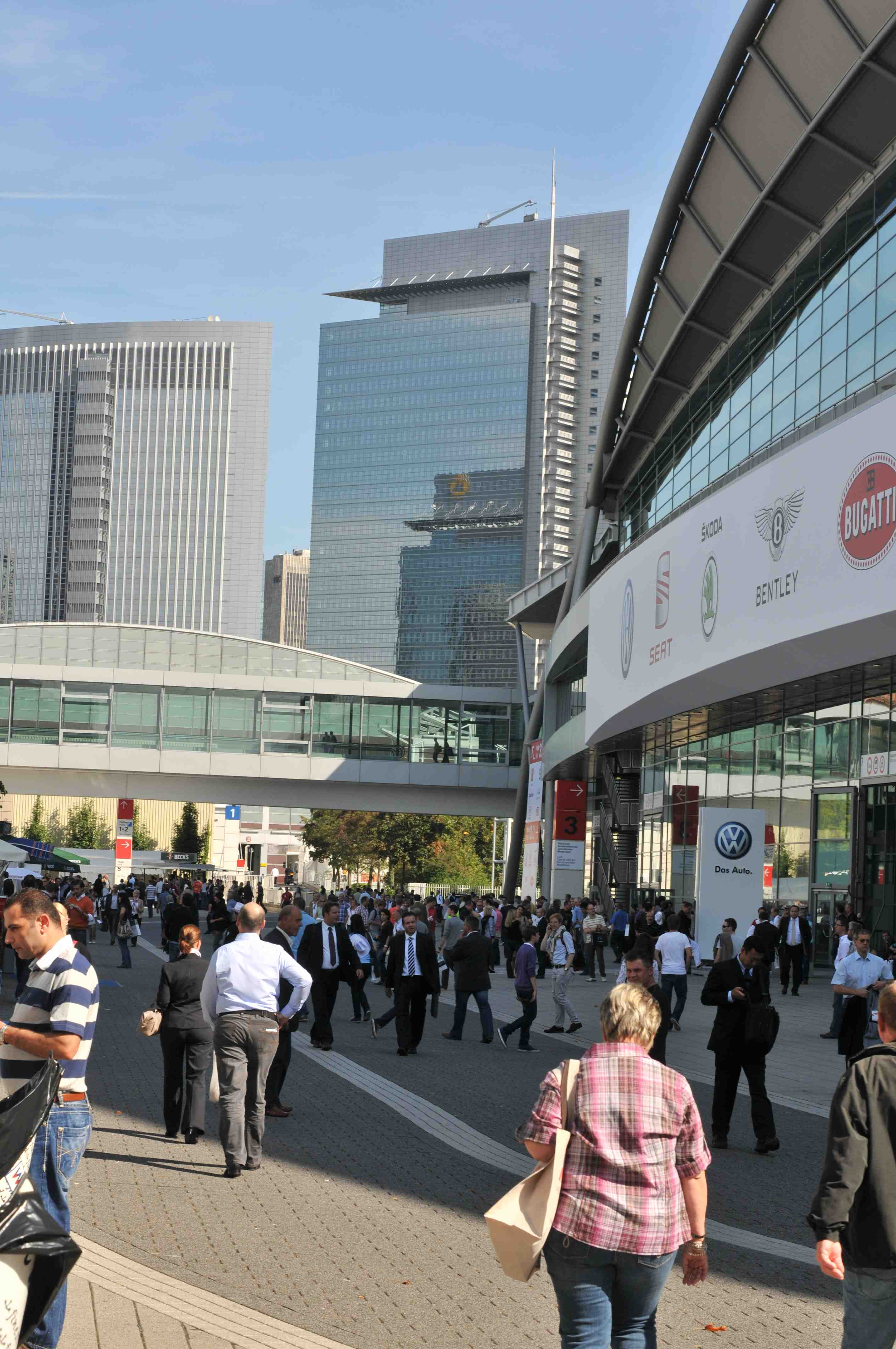 IAA 2011 - Internationale Automobilausstellung in Frankfurt/Main